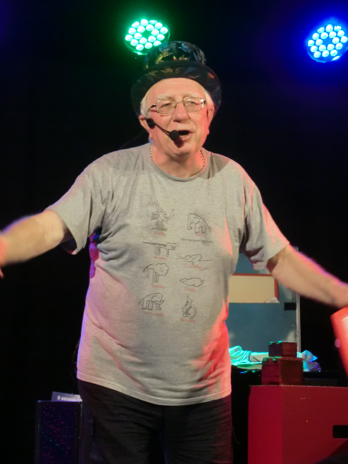 Silvio Mantelli alias Mago Sales